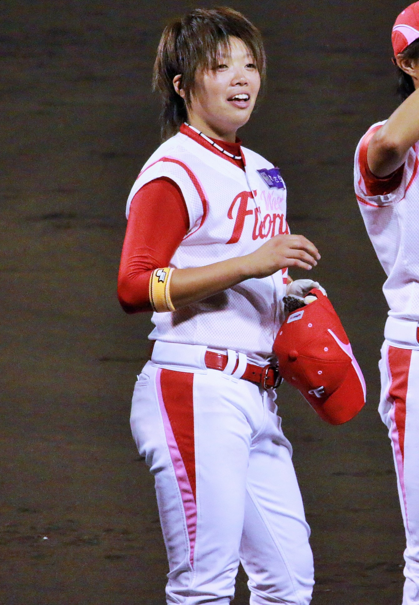 ウエストフローラ中村香澄